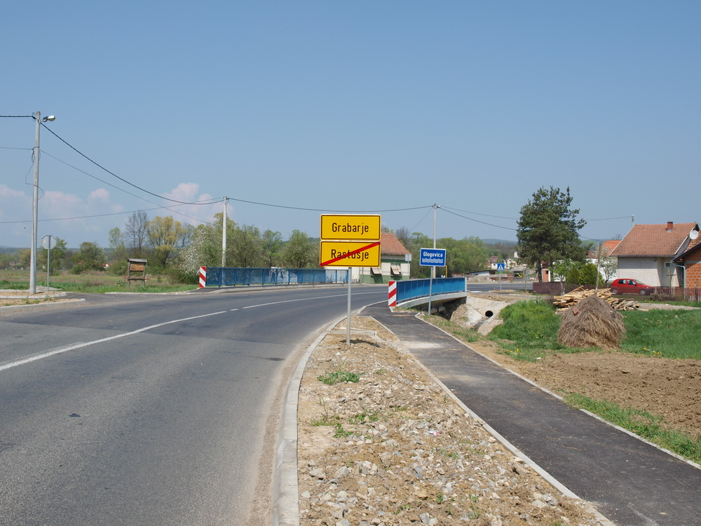 Ulaz u selo Grabarje, Brodsko-posavska županija.